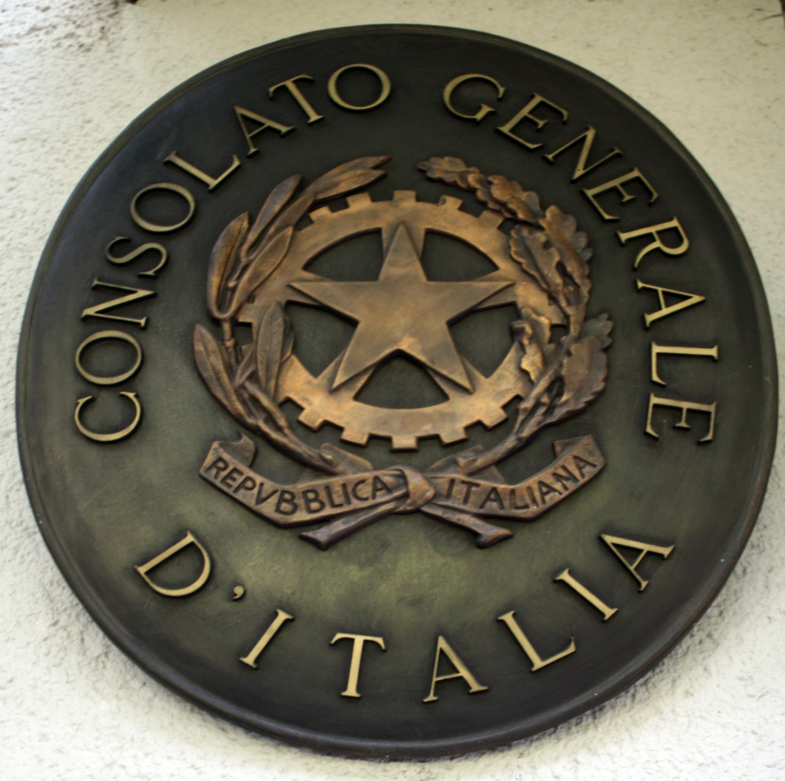 Italienisches Konsulat und Kulturinstitut, Köln